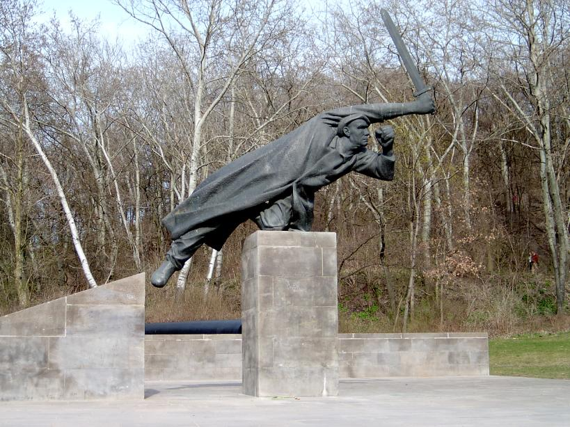 Denkmal für deutsche Spanienkämpfer in Berlin-Friedrichhain von Fritz Cremer (1966-68)